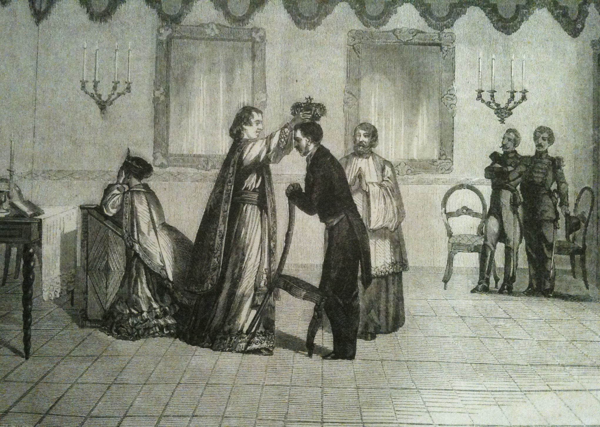 Couronnement de Radama II, dans la chambre de feu la reine Ranavalo, in Le Monde illustré du 24 janvier 1863, p. 53